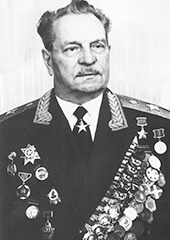 Иван Владимирович Тюленев (1892 — 1978) — советский военачальник, генерал армии